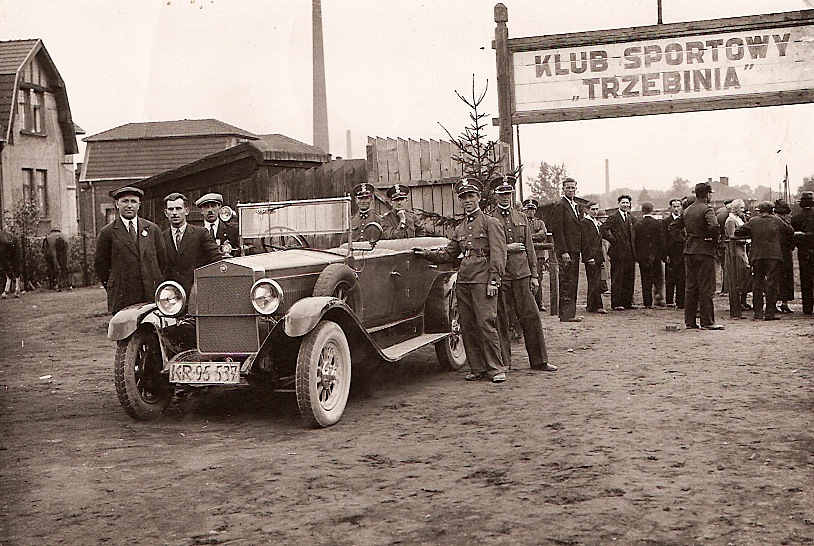 "Sokół" w Trzebini, ok. 1935 (1. od lewej: Jan Baliś z Chrzanowa/The "Sokół" Sport Club in Trzebinia, c. 1935 (1st from the left: Jan Baliś of Chrzanów)